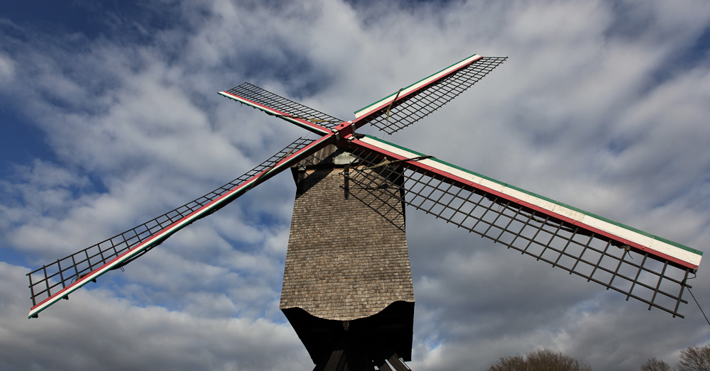 Windmolen Keerbergen